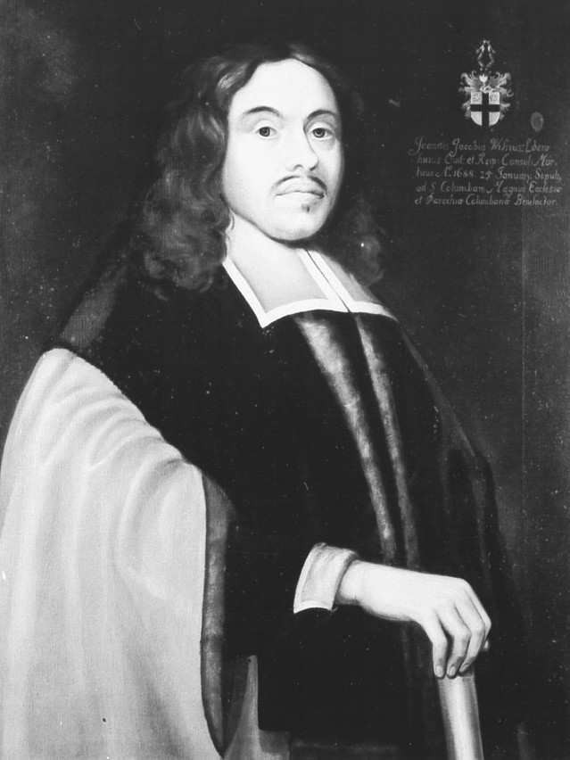 Johann Jakob Wissius, (J. J. Wissius), Bürgermeister von Köln 1682-85